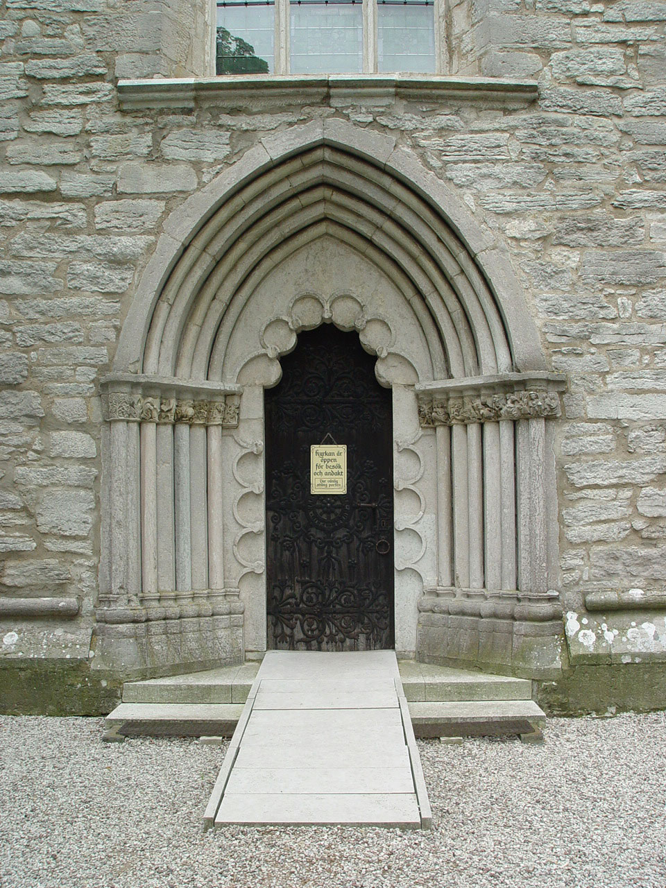 Dalhems kyrka (Gotland)